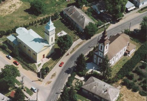 Nagyboldogasszony-templom és Istenszülő elhunyta-templom (15. sz., görögkatolikus templom, gótikus, 15. sz. Átalakítva a 18. sz.-ban., azonosító 8261 (törzsszám 6121)) Kállósemjén, Hungary, aerial photography